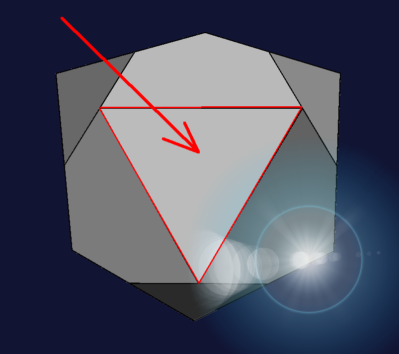 Vienādšķautņu trīstūra skaldnes vizualizācija